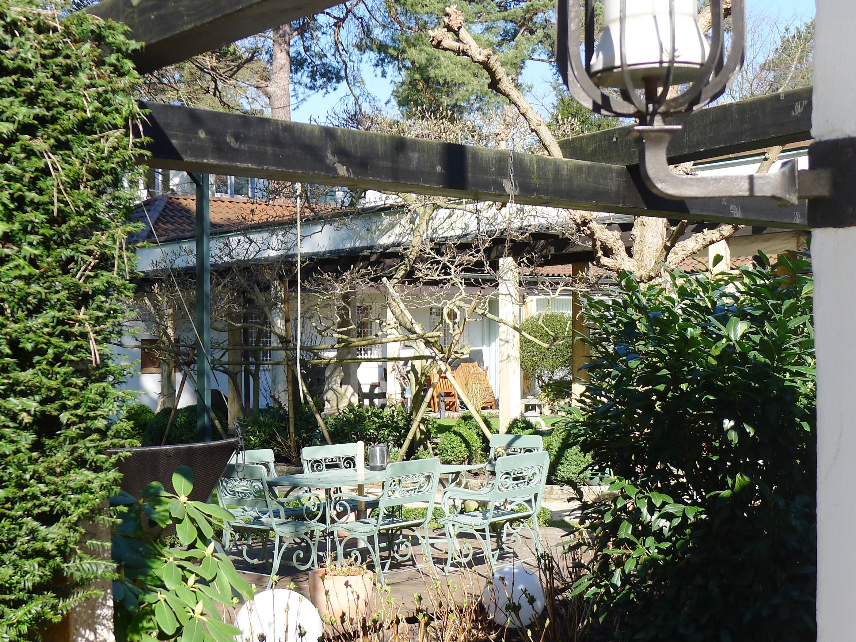 Einfamilienhaus